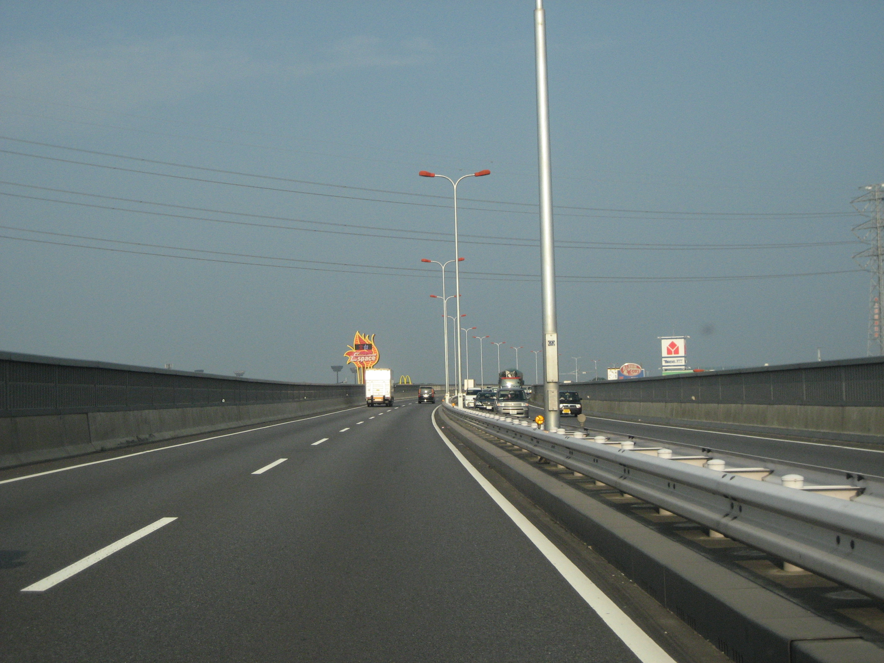 国道17号線熊谷バイパス（埼玉県熊谷市肥塚付近）